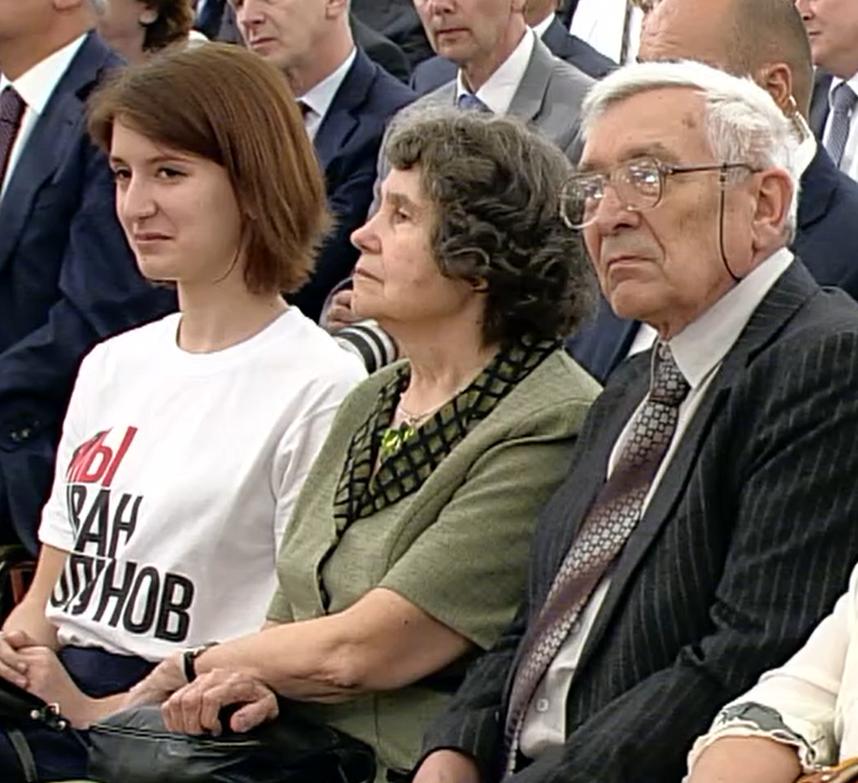 Николаю Луганскому – за вклад в развитие отечественной и мировой музыкальной культуры